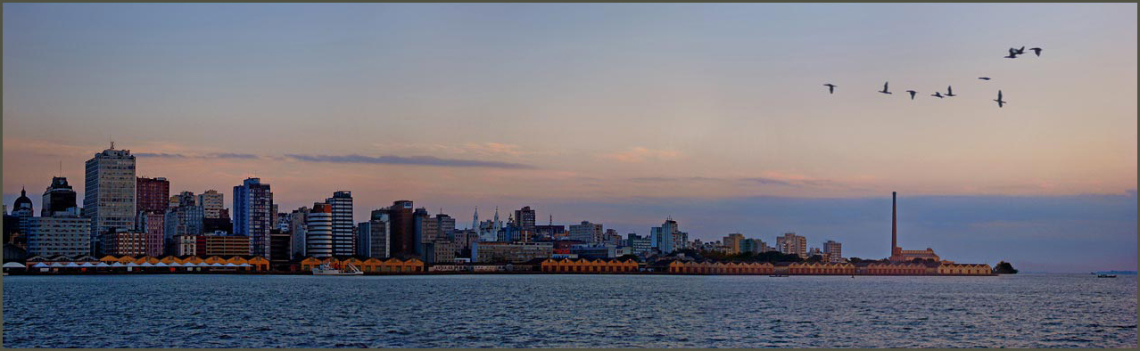 Panorâmica do Cais Mauá, parte do porto de Porto Alegre, Brasil.